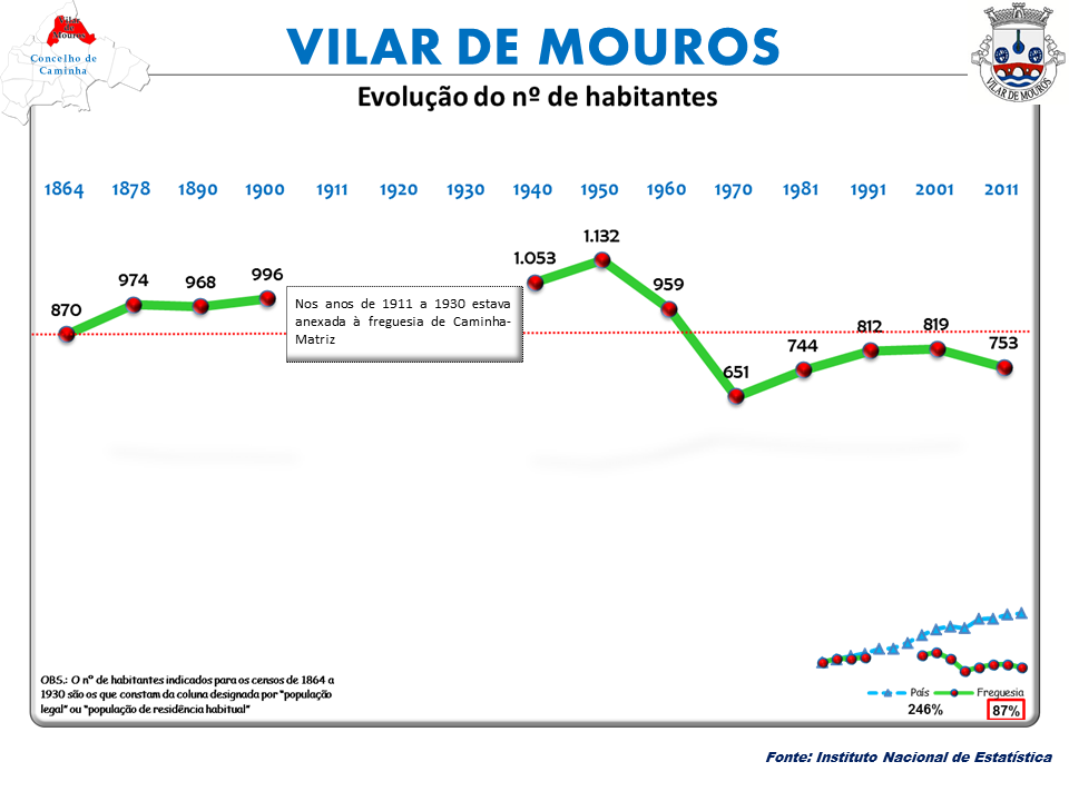 Censos 1864/2011